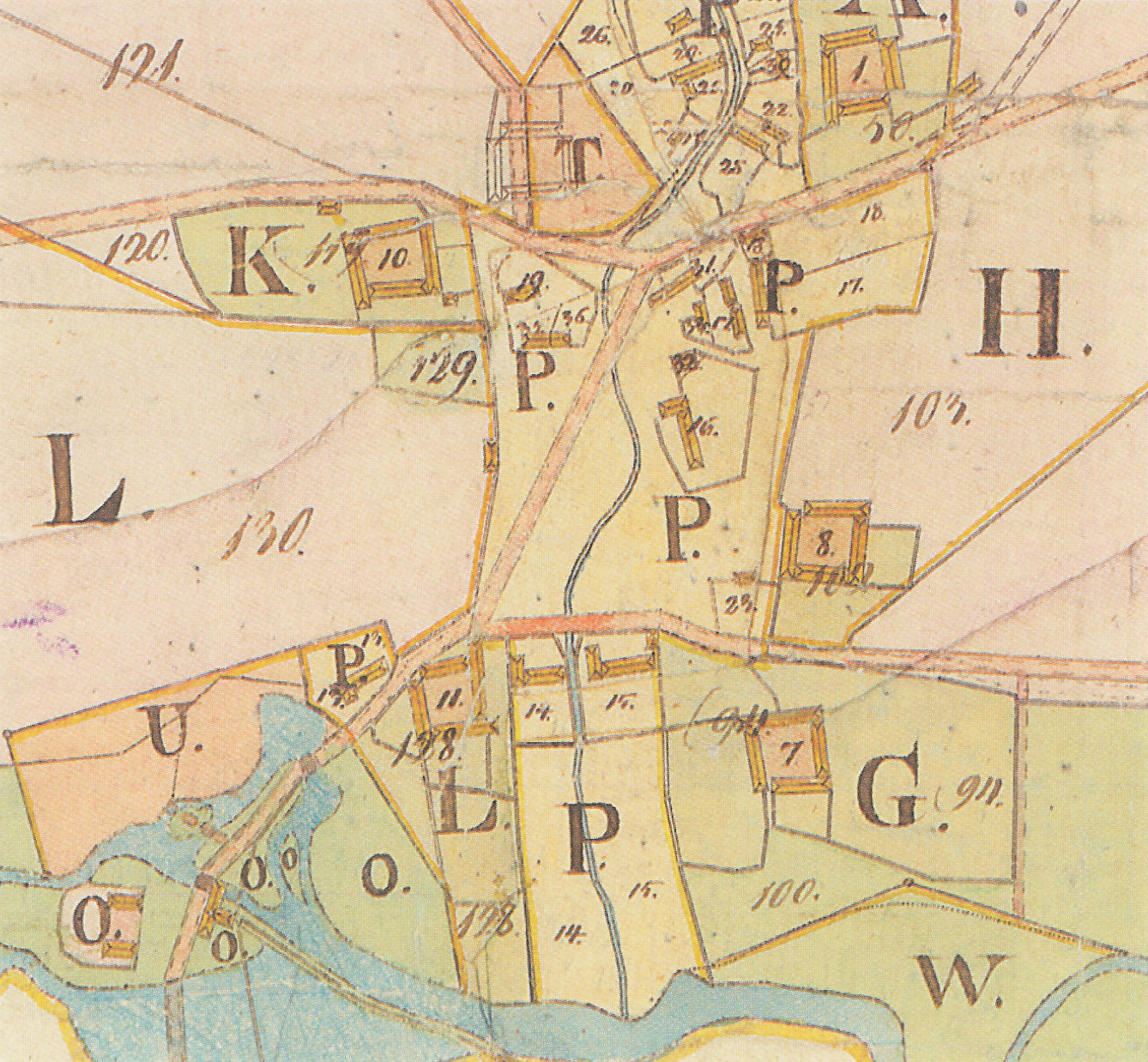 Karta över byplatsen i Värpinge by, 1822